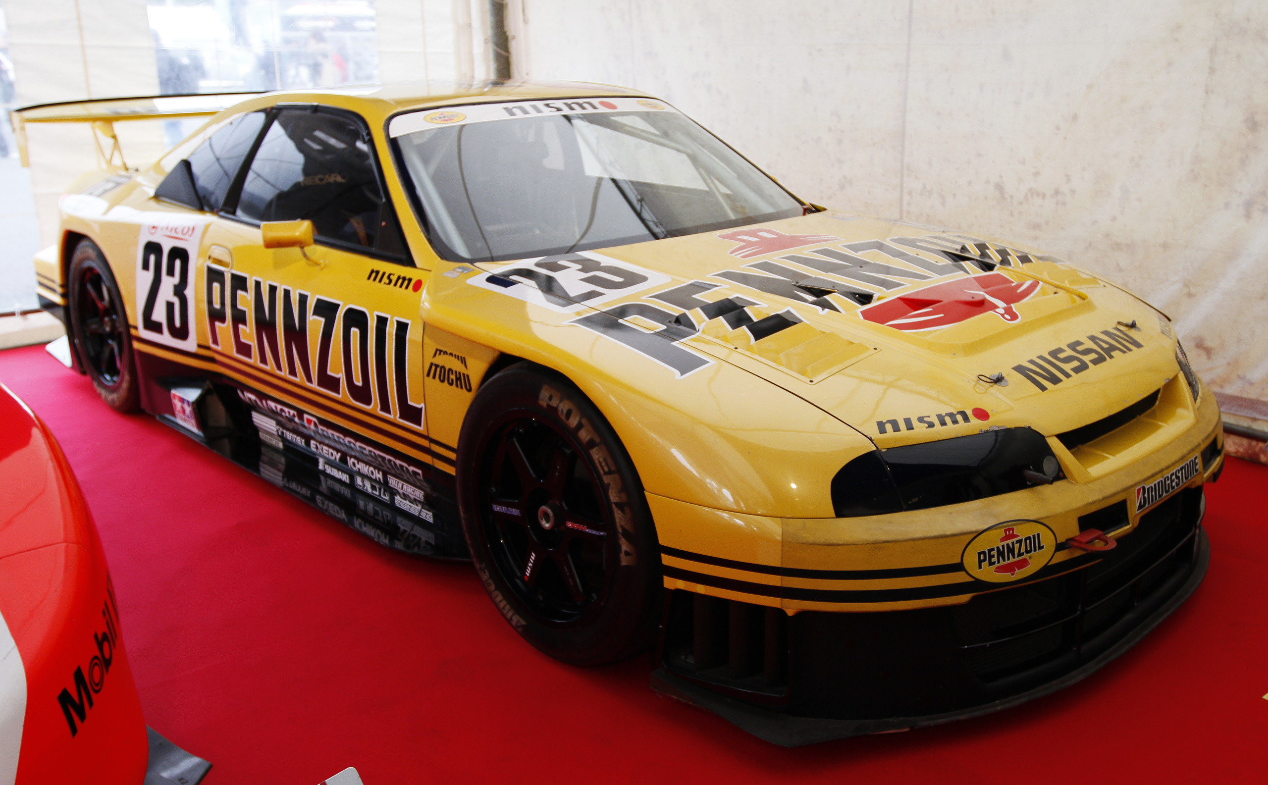 2010 JAF Grand Prix: 1998 Penzoil Nismo GT-R